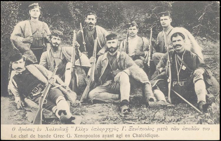 Георгиос Галанопулос